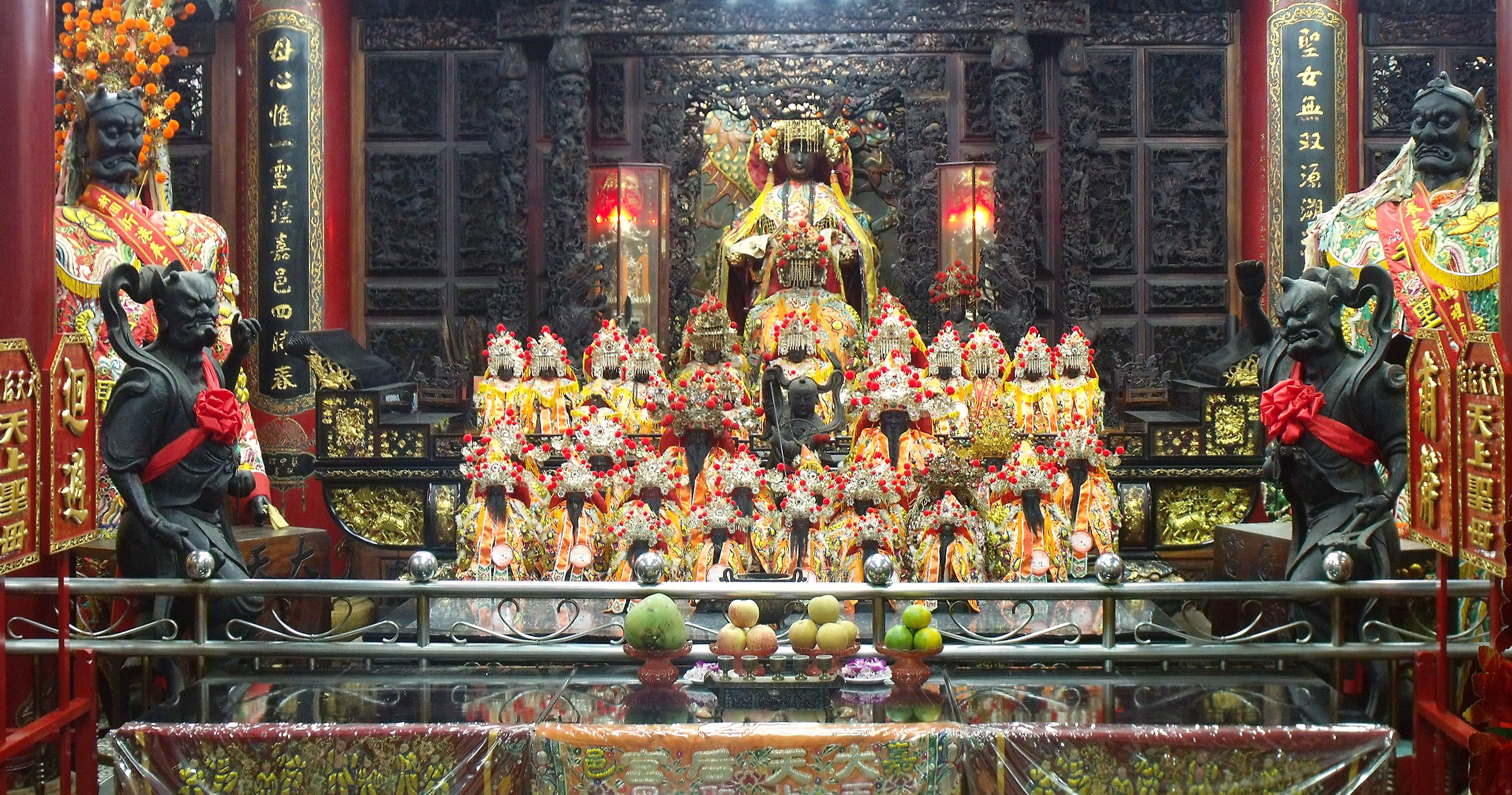 嘉邑城隍廟媽祖殿